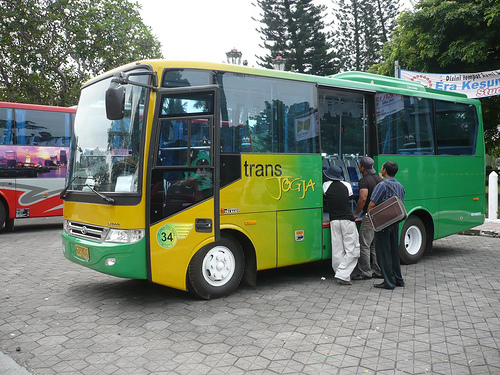 Transjogja